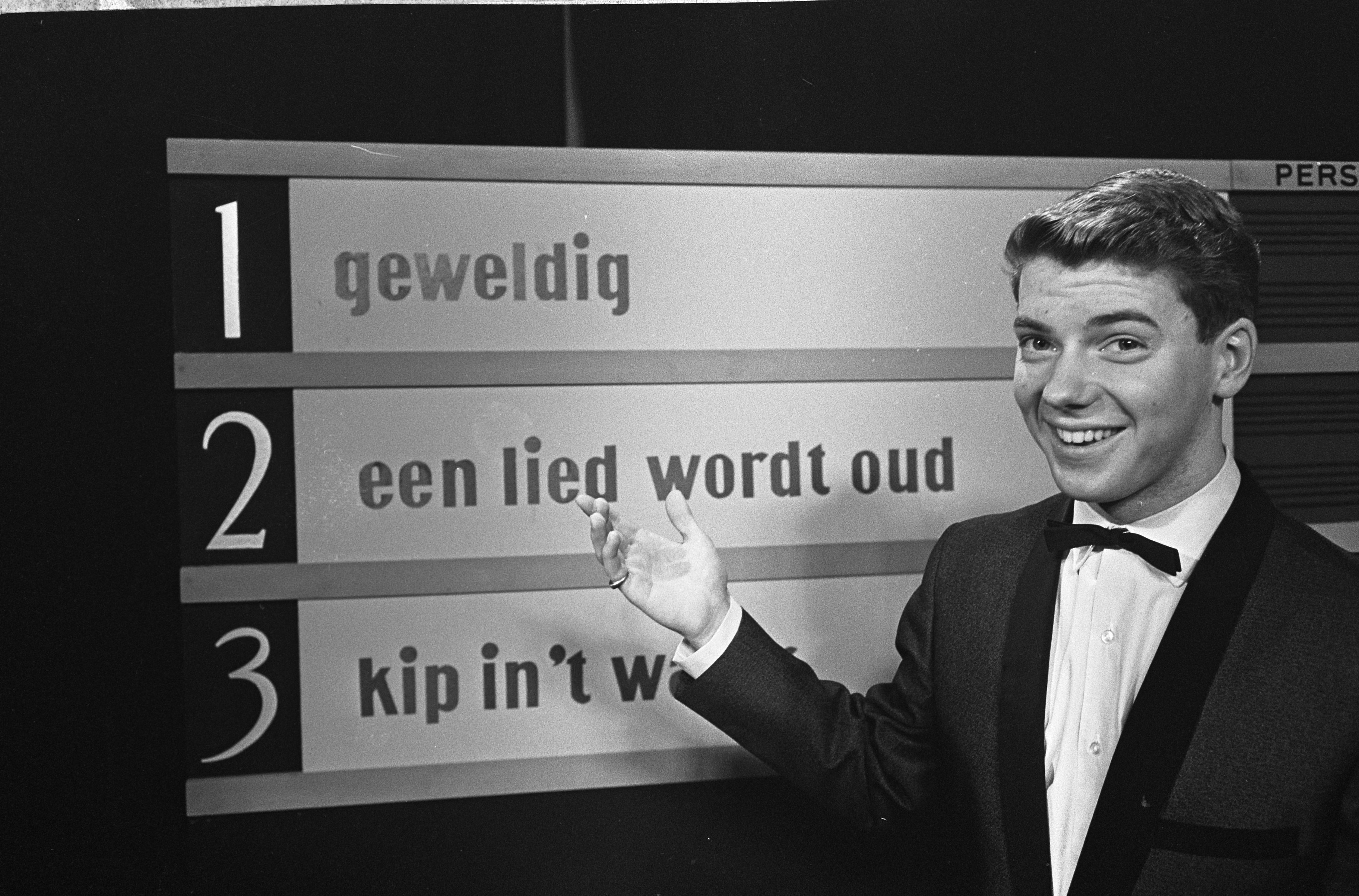 Collectie / Archief : Fotocollectie Anefo Reportage / Serie : [ onbekend ] Beschrijving : Voorronde finale Nationaal Songfestival 1965, Ronnie Tober voor bord met liedjes Datum : 9 februari 1965 Trefwoorden : artiesten, muziek, songfestivals, zangers Persoonsnaam : Tober, Ronnie Instellingsnaam : Nationaal Songfestival Fotograaf : Koch, Eric / Anefo Auteursrechthebbende : Nationaal Archief Materiaalsoort : Negatief (zwart/wit) Nummer archiefinventaris : bekijk toegang 2.24.01.05 Bestanddeelnummer : 917-4142